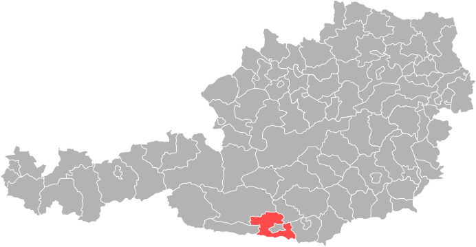 Bezirk Villach-Land in Österreich